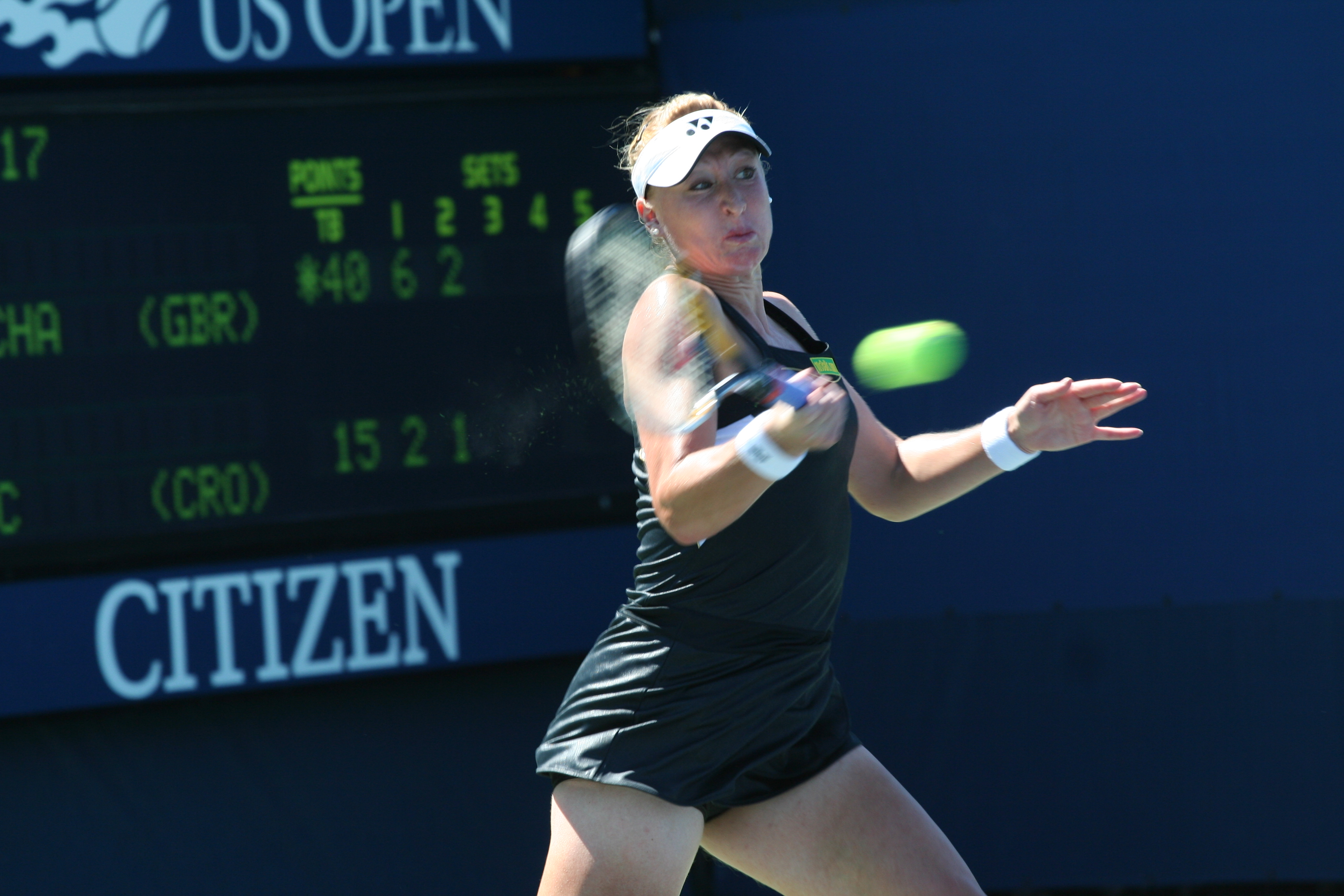 U.S. Open Aug. 30, 2010